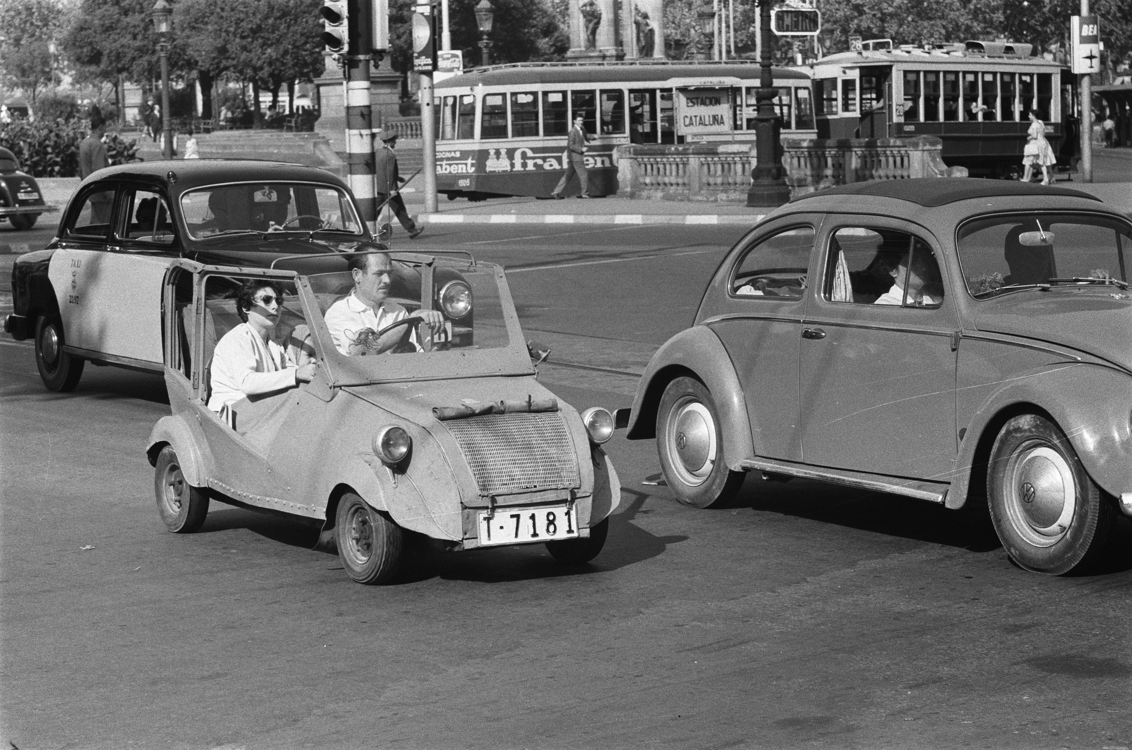 Collectie / Archief : Fotocollectie Anefo Reportage / Serie : [ onbekend ] Beschrijving : Serie over Spanje Datum : 5 oktober 1960 Locatie : Spanje Trefwoorden : auto's Fotograaf : Pot, Harry / Anefo Auteursrechthebbende : Nationaal Archief Materiaalsoort : Negatief (zwart/wit) Nummer archiefinventaris : bekijk toegang 2.24.01.05 Bestanddeelnummer : 911-6501